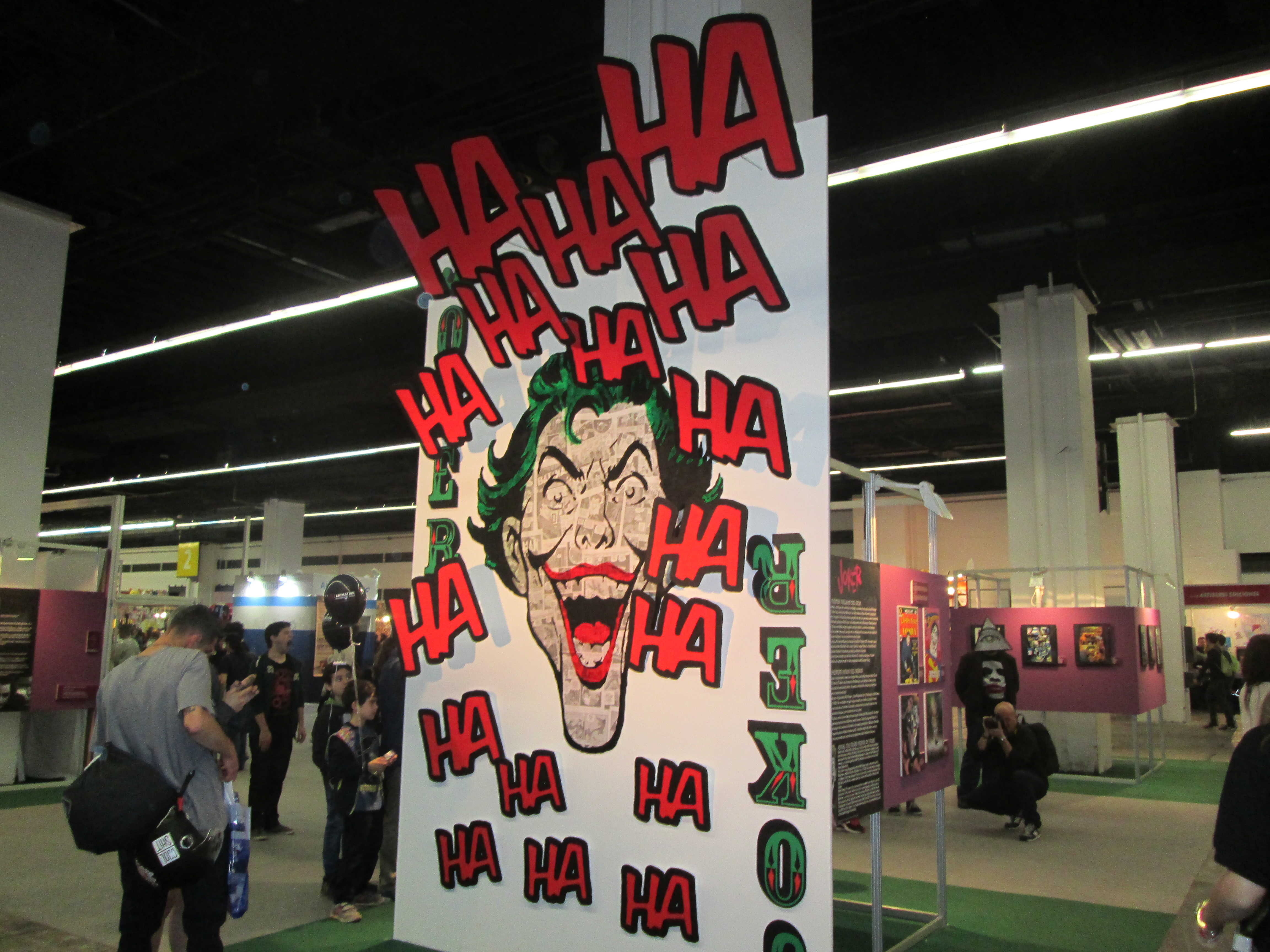 Joker: 75 anys del príncep pallasso del crim. Exposició monogràfica dedicada a Jocker, l'acèrrim enemic de Batman. Va aparèixer el 1940 en el primer còmic de Batman, creat per Bob Kane, Bill Finger i Jerry Robinson.